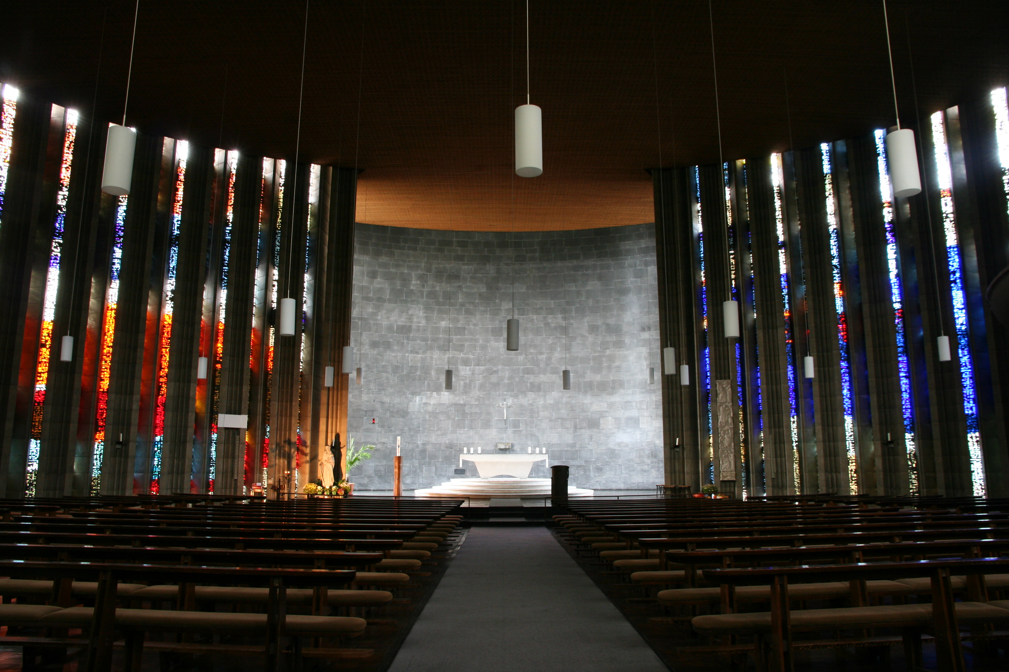 Römisch-katholische Pfarrkirche St. Josef Baden-Baden